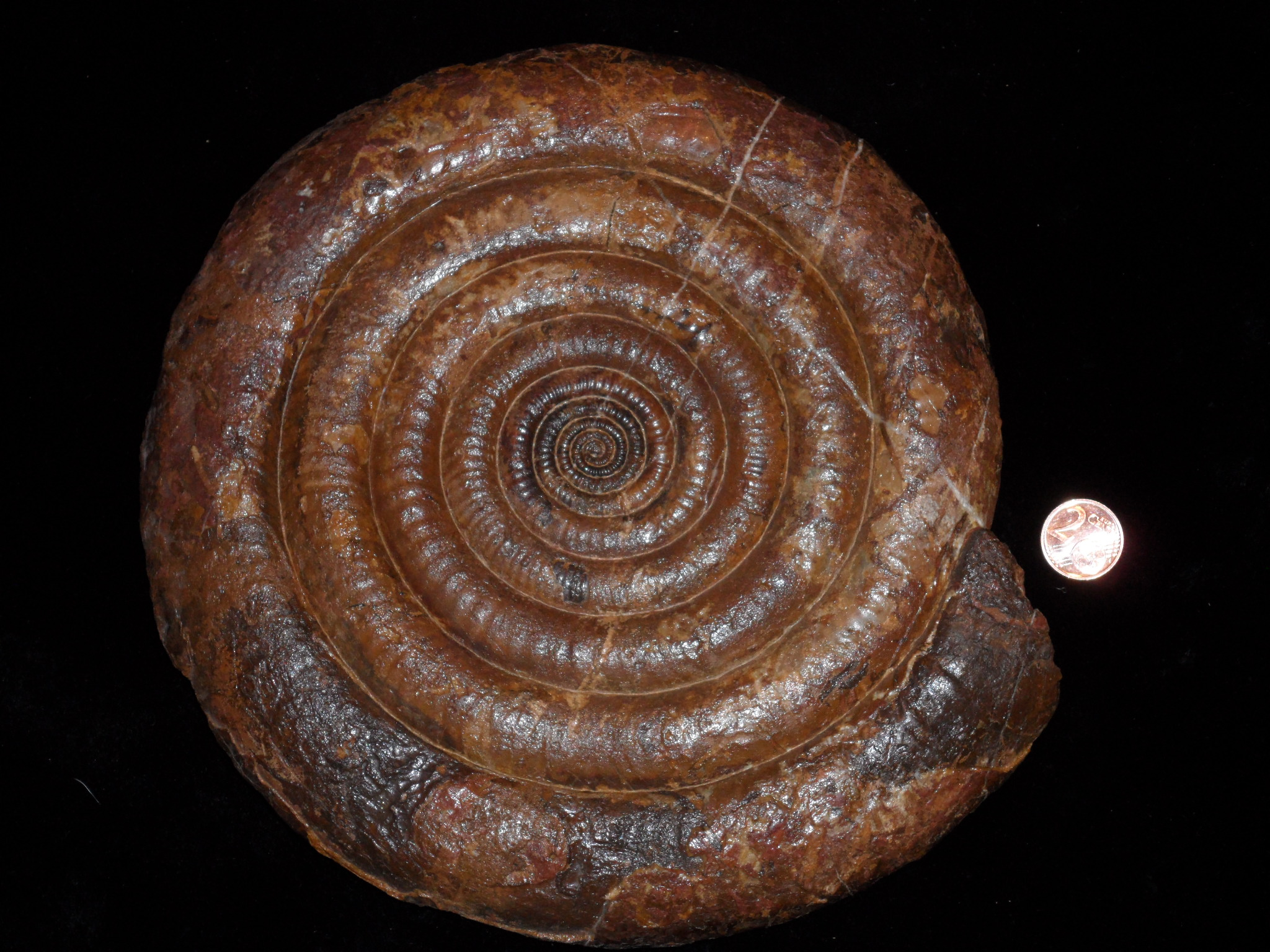 Alsatites proaries, Sammlung Reiter